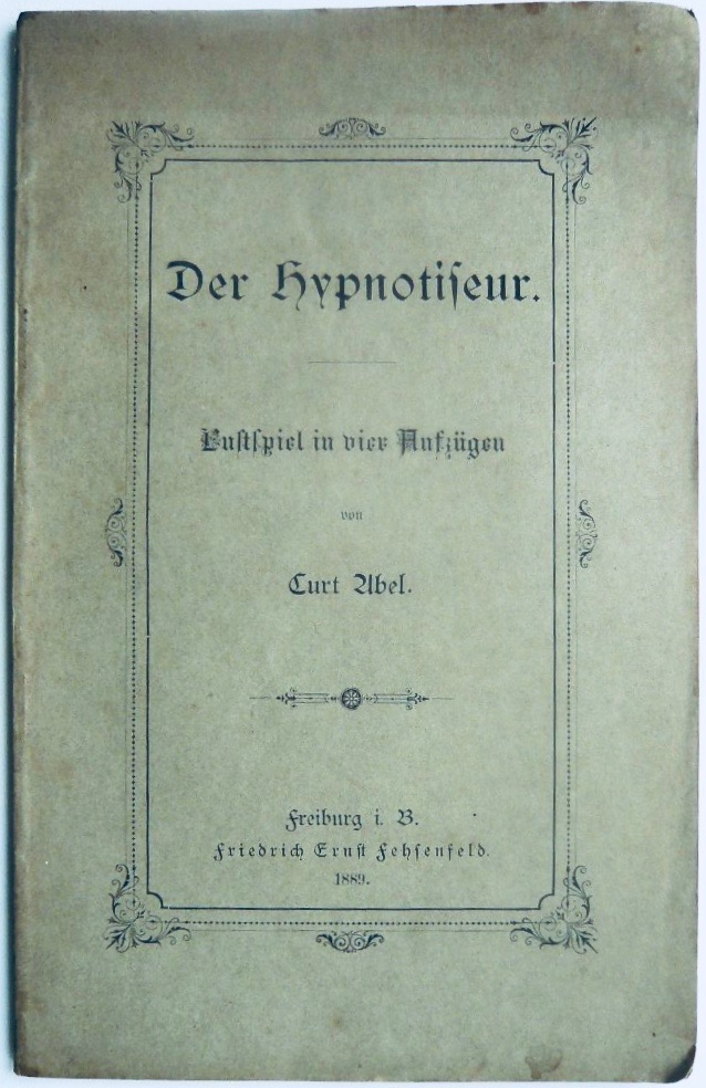 Curt Abel: De hypnotiseur. Uitgeverij Friedrich Ernst Fehsenfeld, Freiburg im Breisgau 1889.